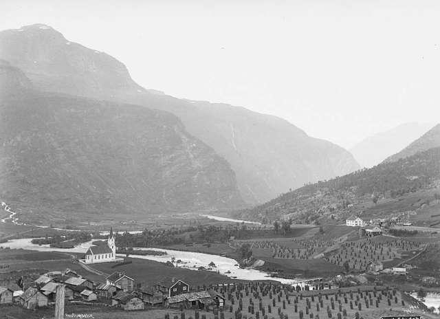 Fortun med Fortun kyrkje (1879- )